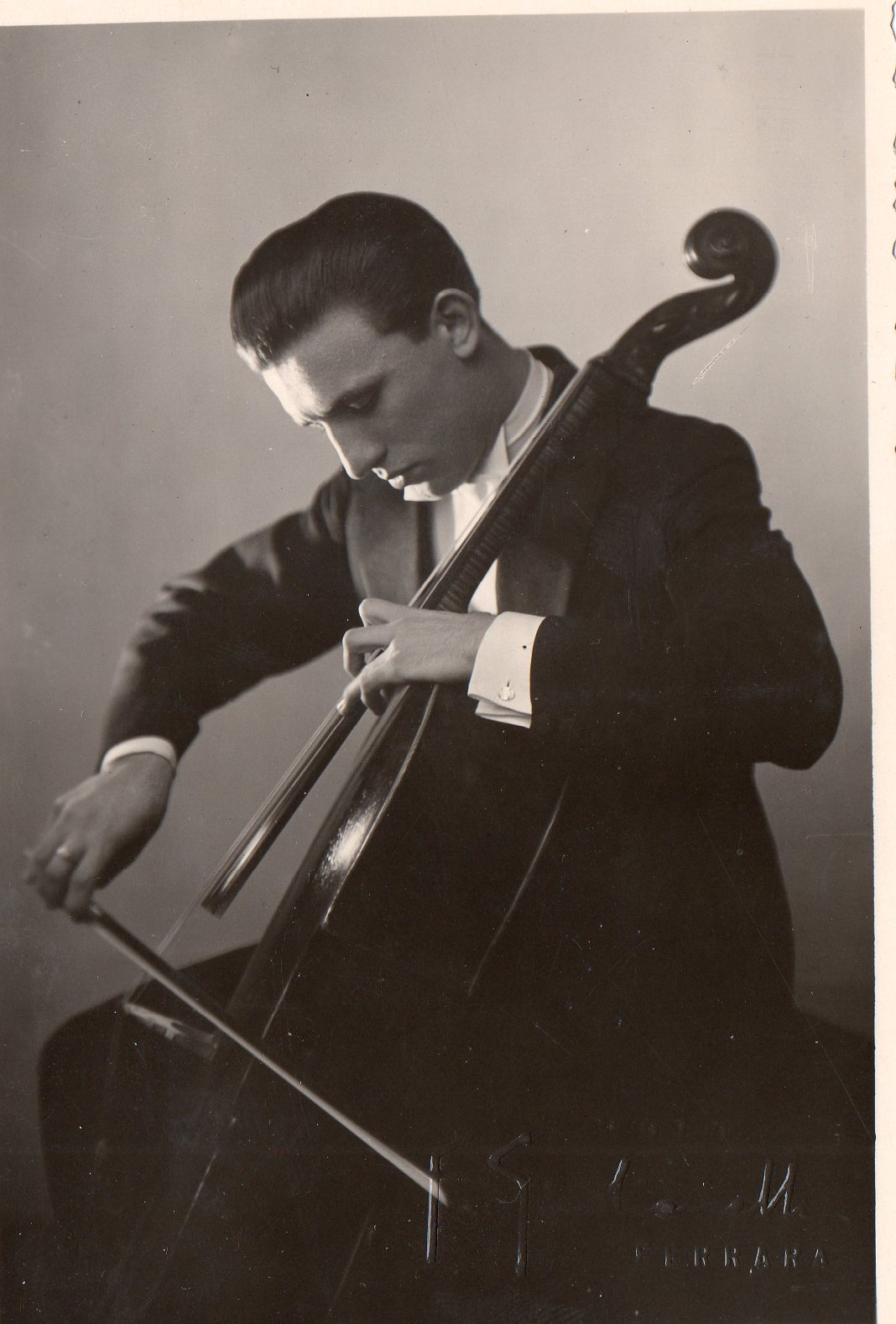 Dicembre 1951 Ferrara